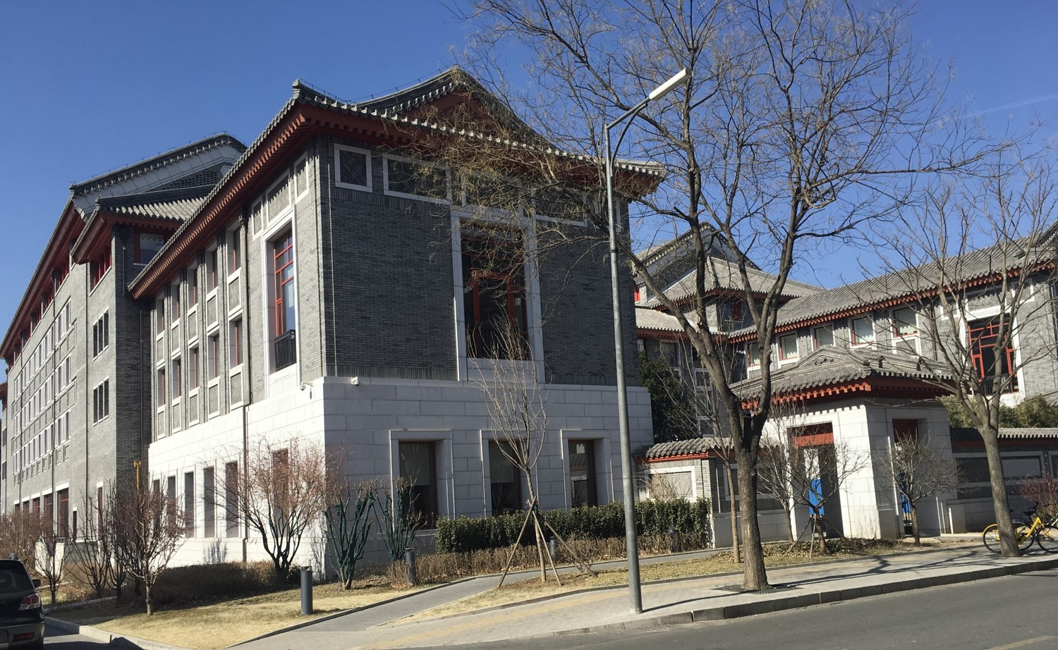 清華大學蘇世民書院